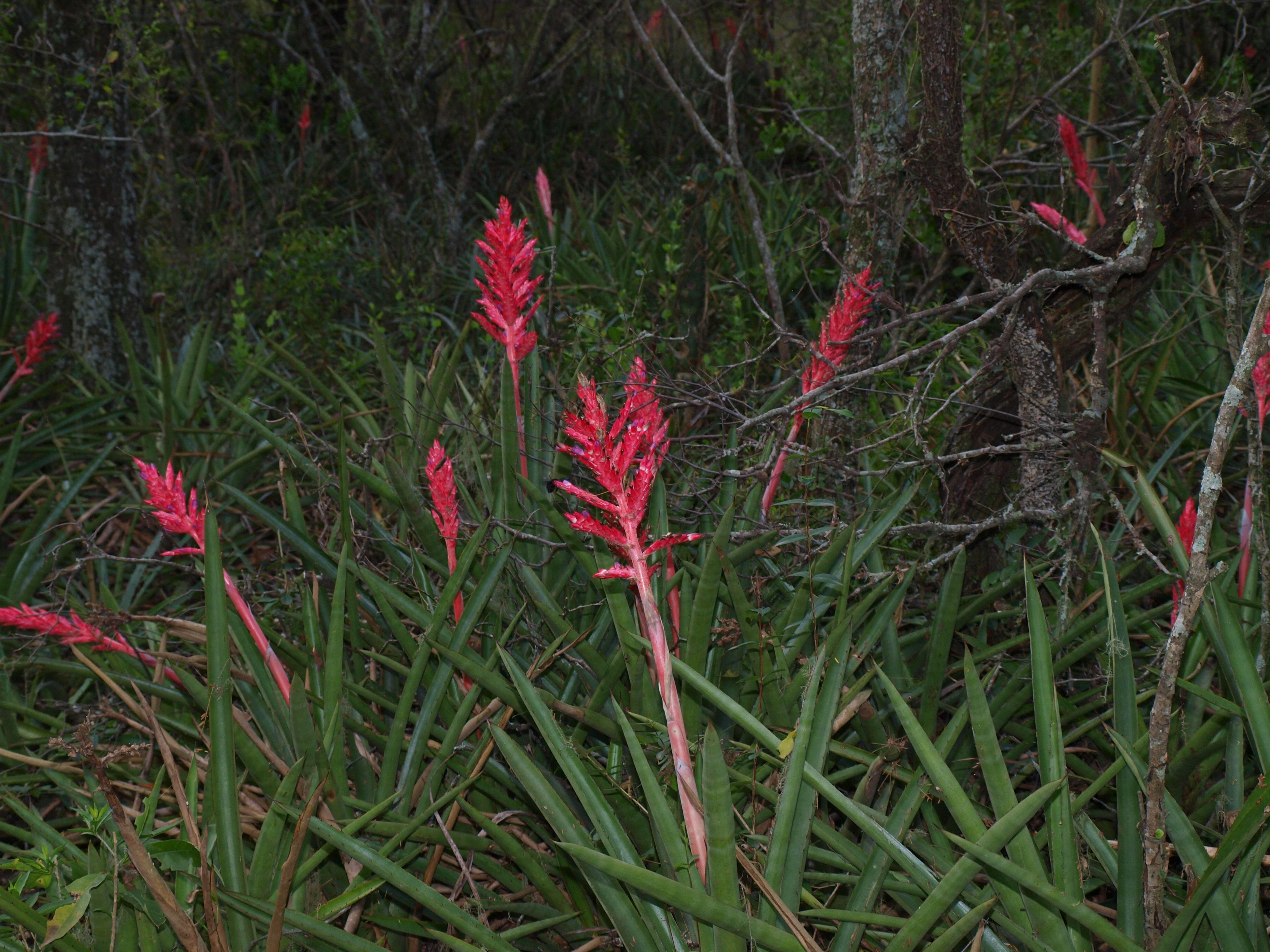 Caraguatal de Aechmea distichantha en floración en la Cuña Boscosa Santafesina (Argentina)